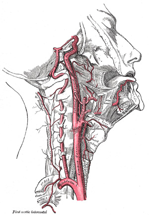 Hirnversorgende Arterien des Halses (A. carotis vorne, A. vertebralis hinten)